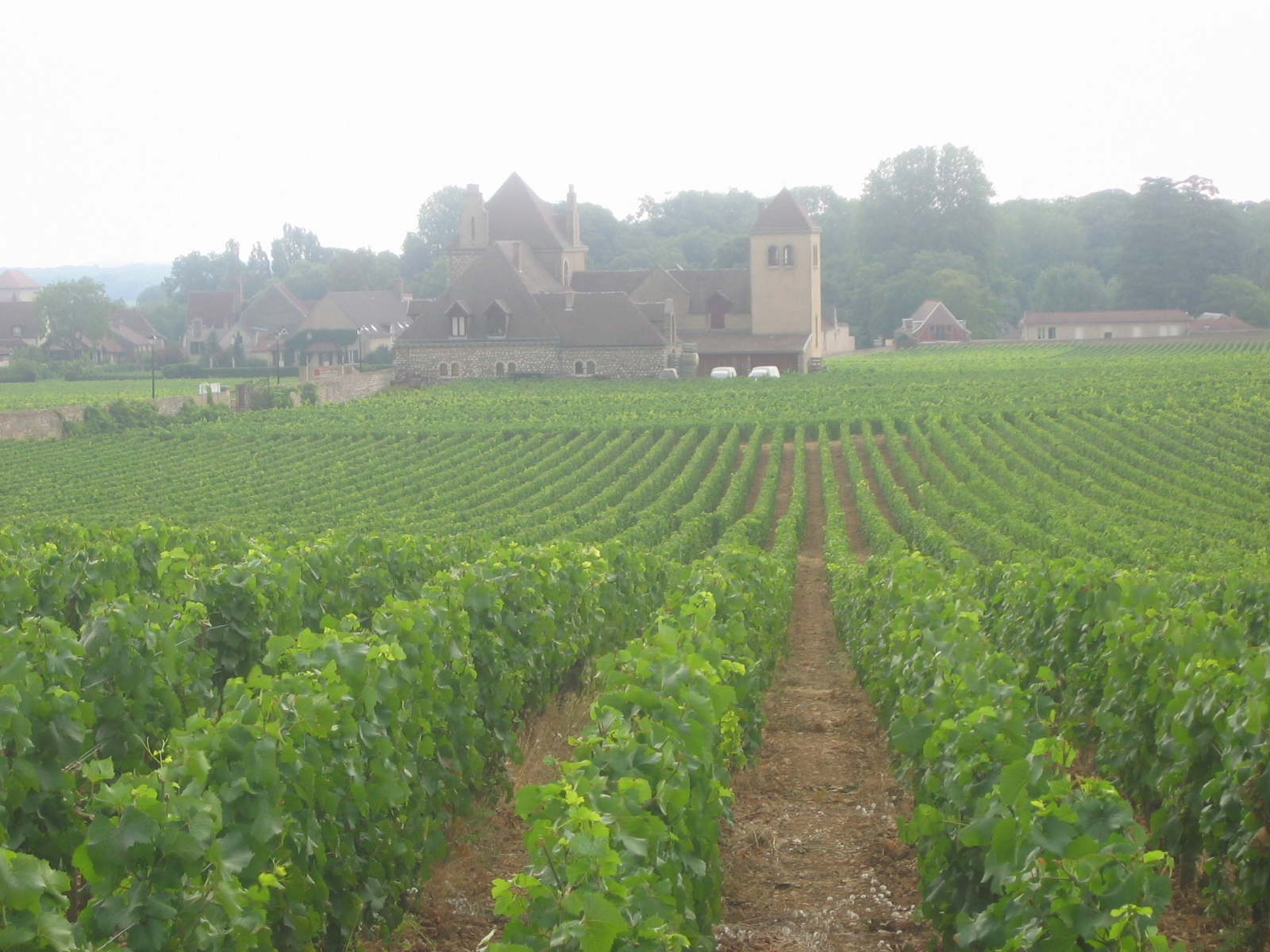 Château Vougeot, Bourgogne, France.